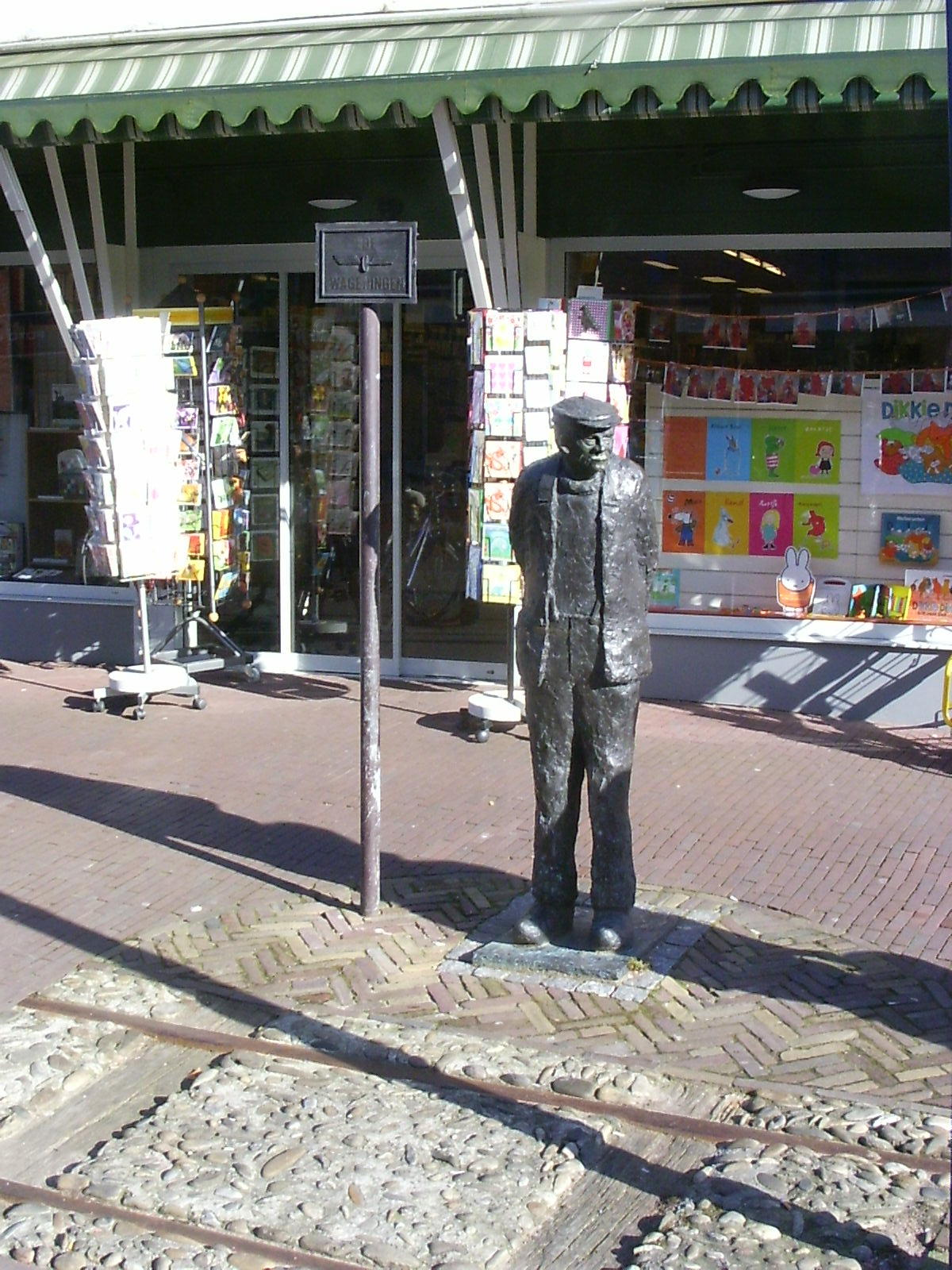 Bennekoms boertje wachtend op de tram. Let ook op de rails.